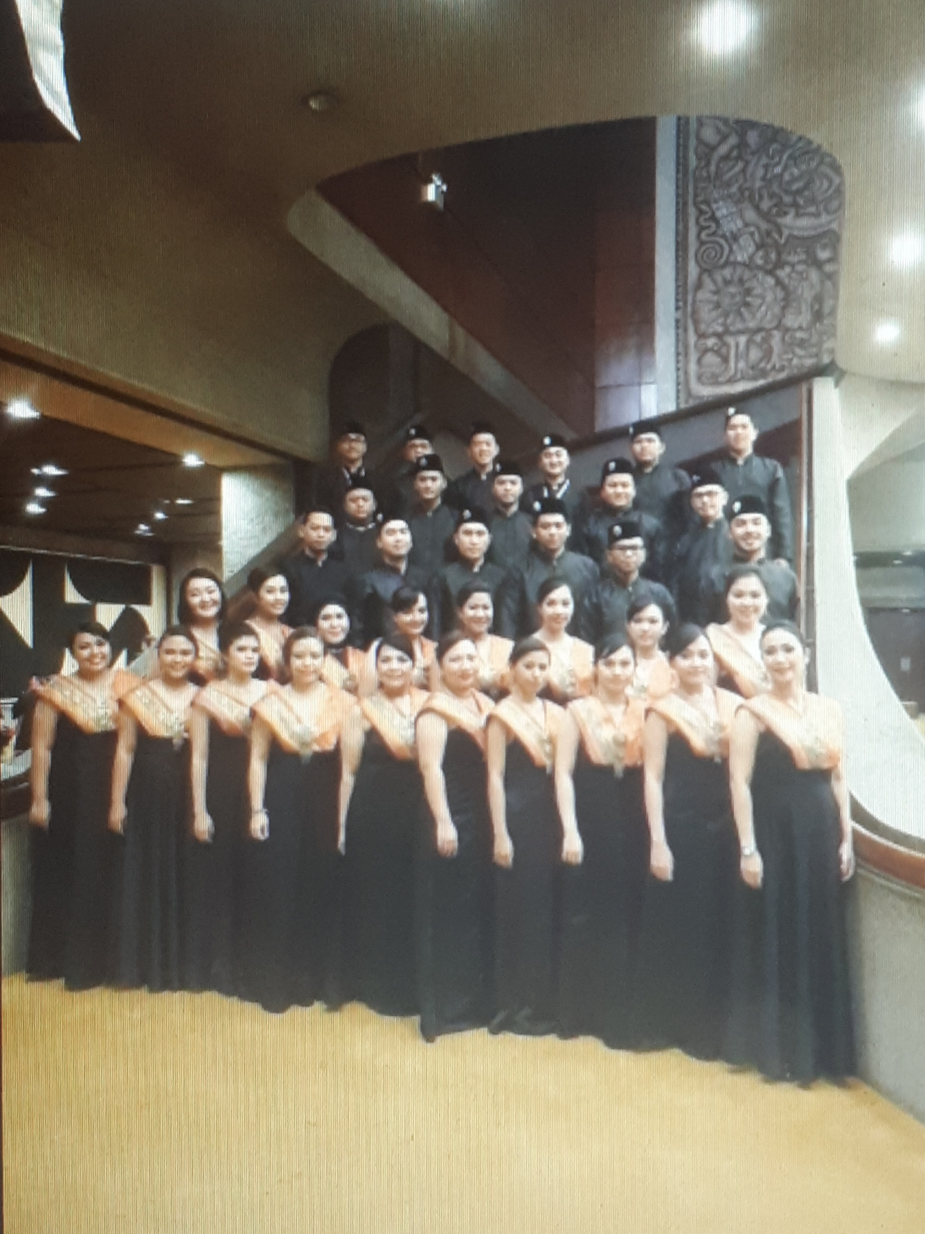 Manila Archies